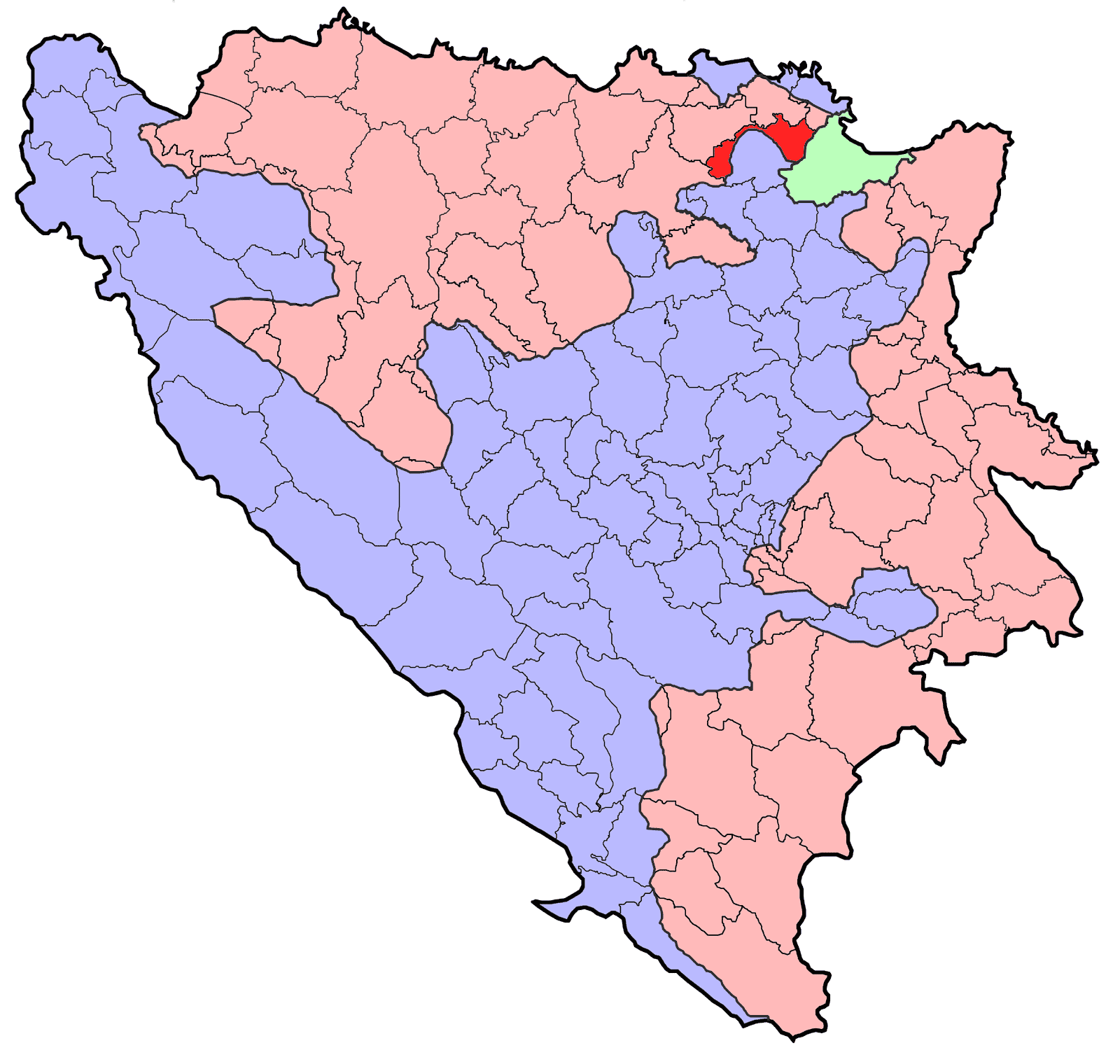 Republika Srpska (BiH) municipality